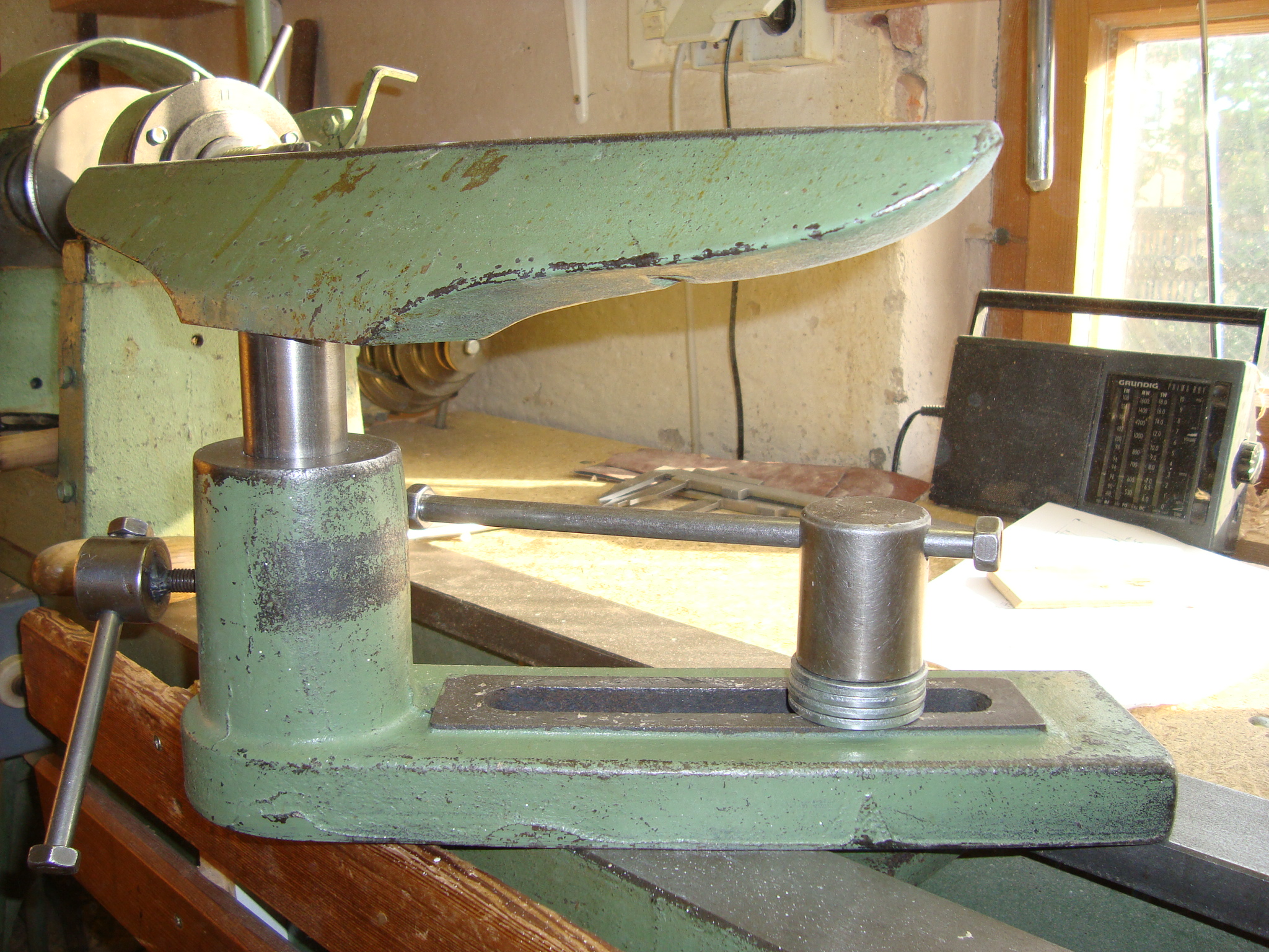 Handauflage einer Holzdrehbank